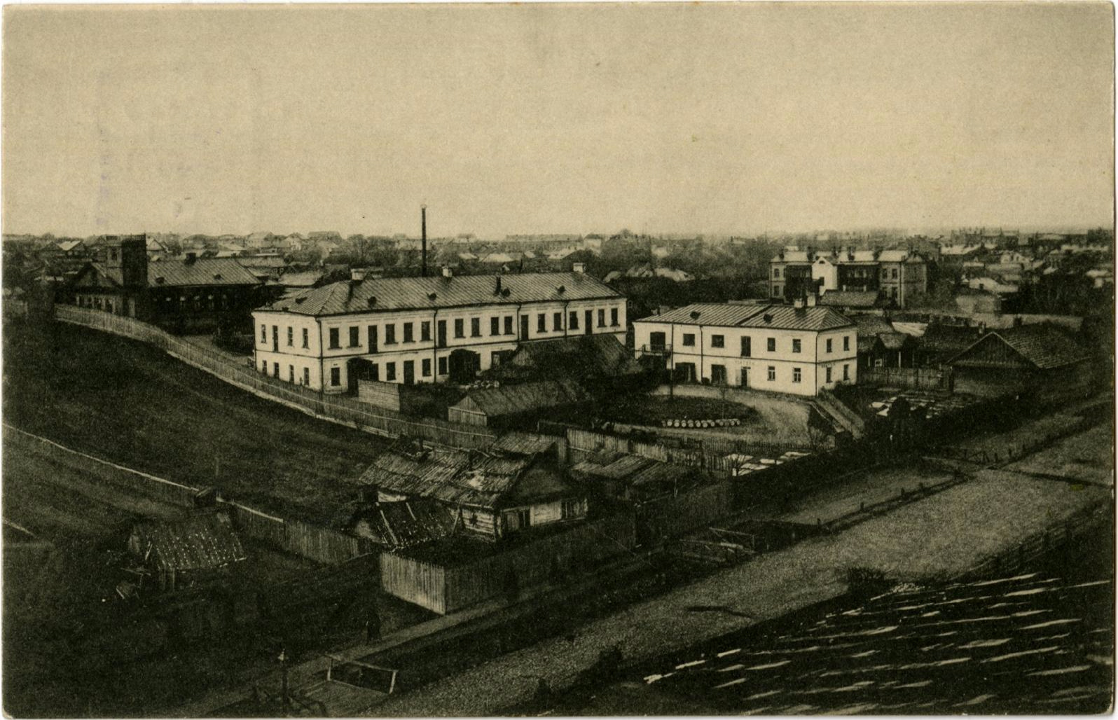 Беларуская (тарашкевіца): Менск (Miensk), шпалерная фабрыка Кантаровіча ў прадмесьці Раманаўскай Слабадзе (Ramanaŭskaja Słabada). На пярэднім пляне рака Няміга (Niamiha)